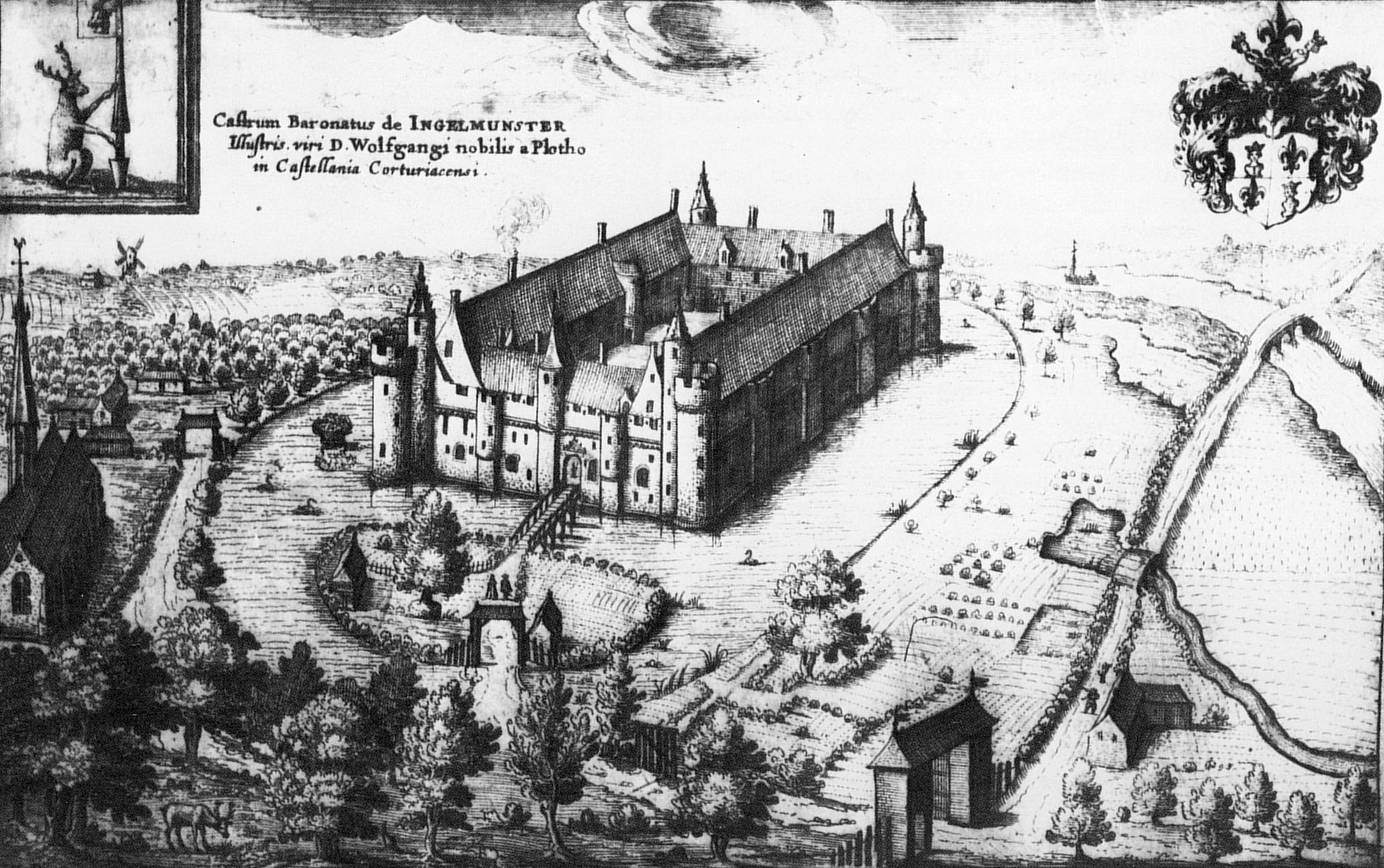 Stich mit der Abbildung des Schlosses Ingelmuster